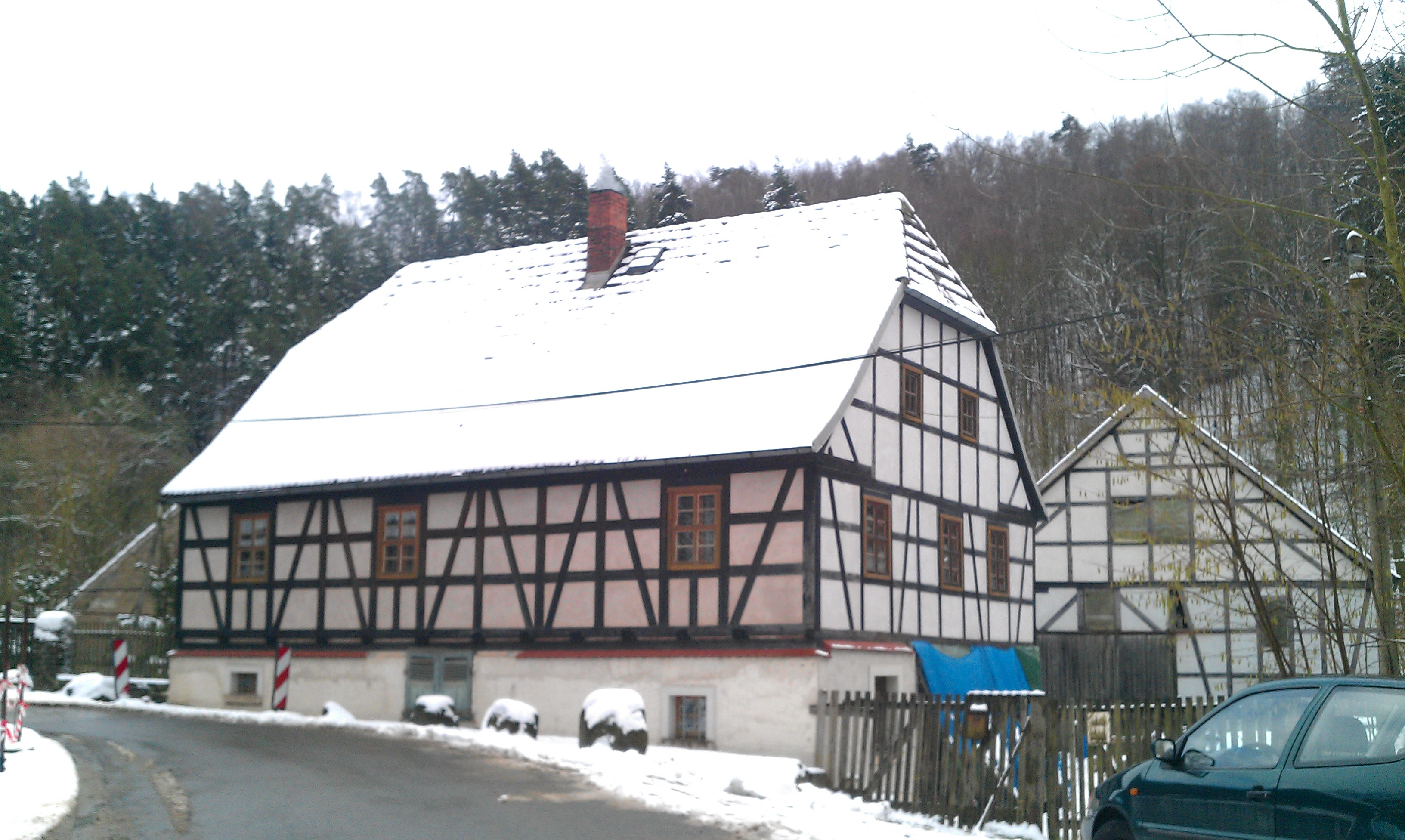 Gebäude des Eisenhammers